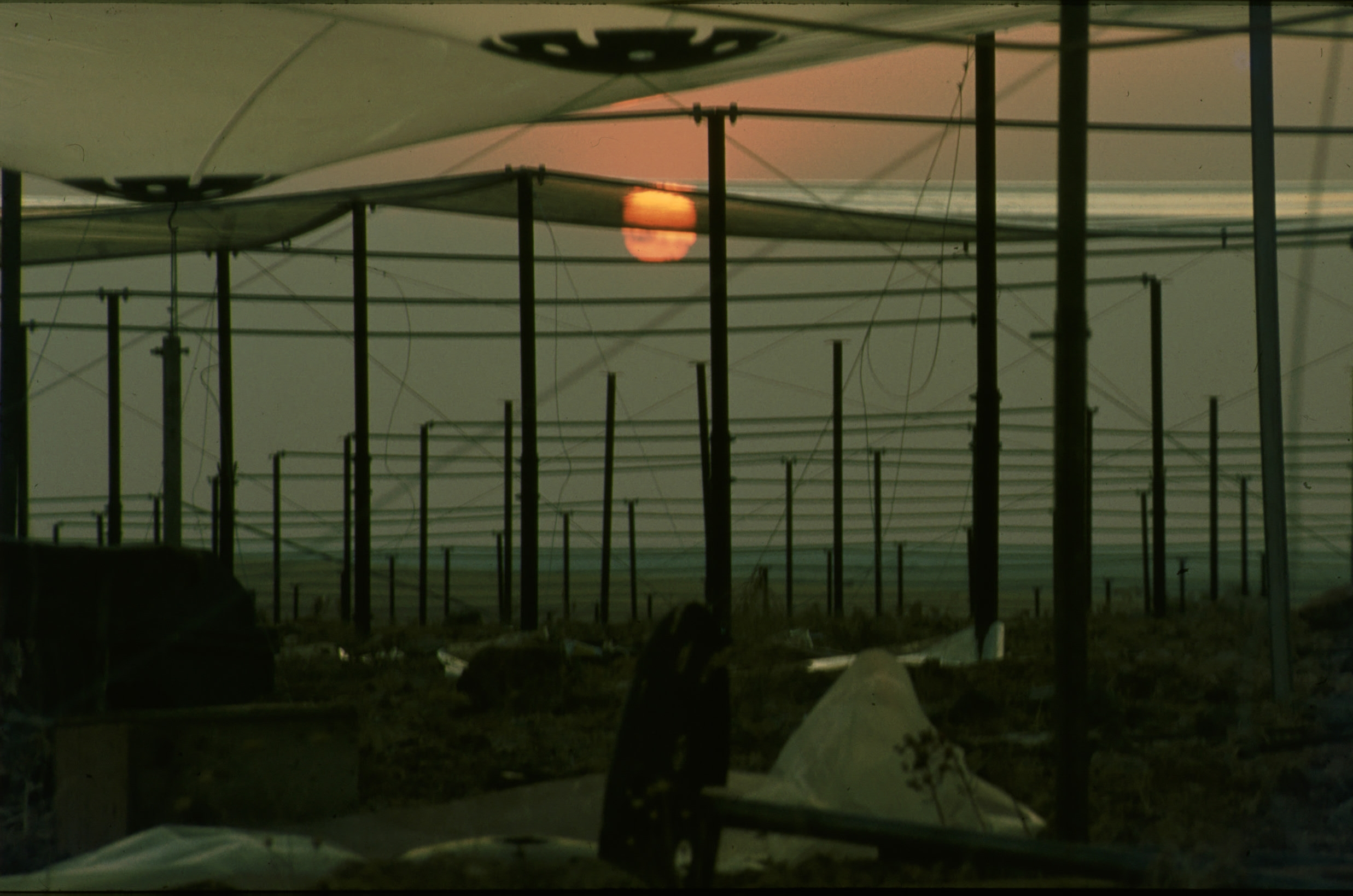 Aufwindkraftwerk Manzanares; erste Vordachversion nach dem ersten Sturm